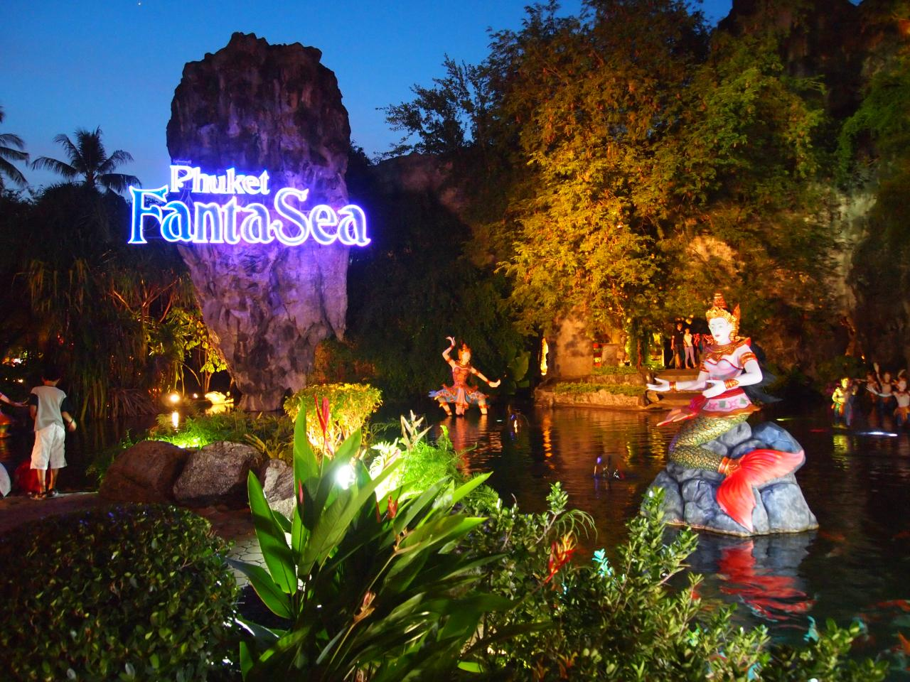 Phuket FantaSea